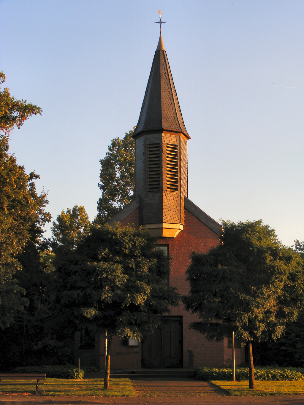 Foto der Kirche St. Josef Krauthausen